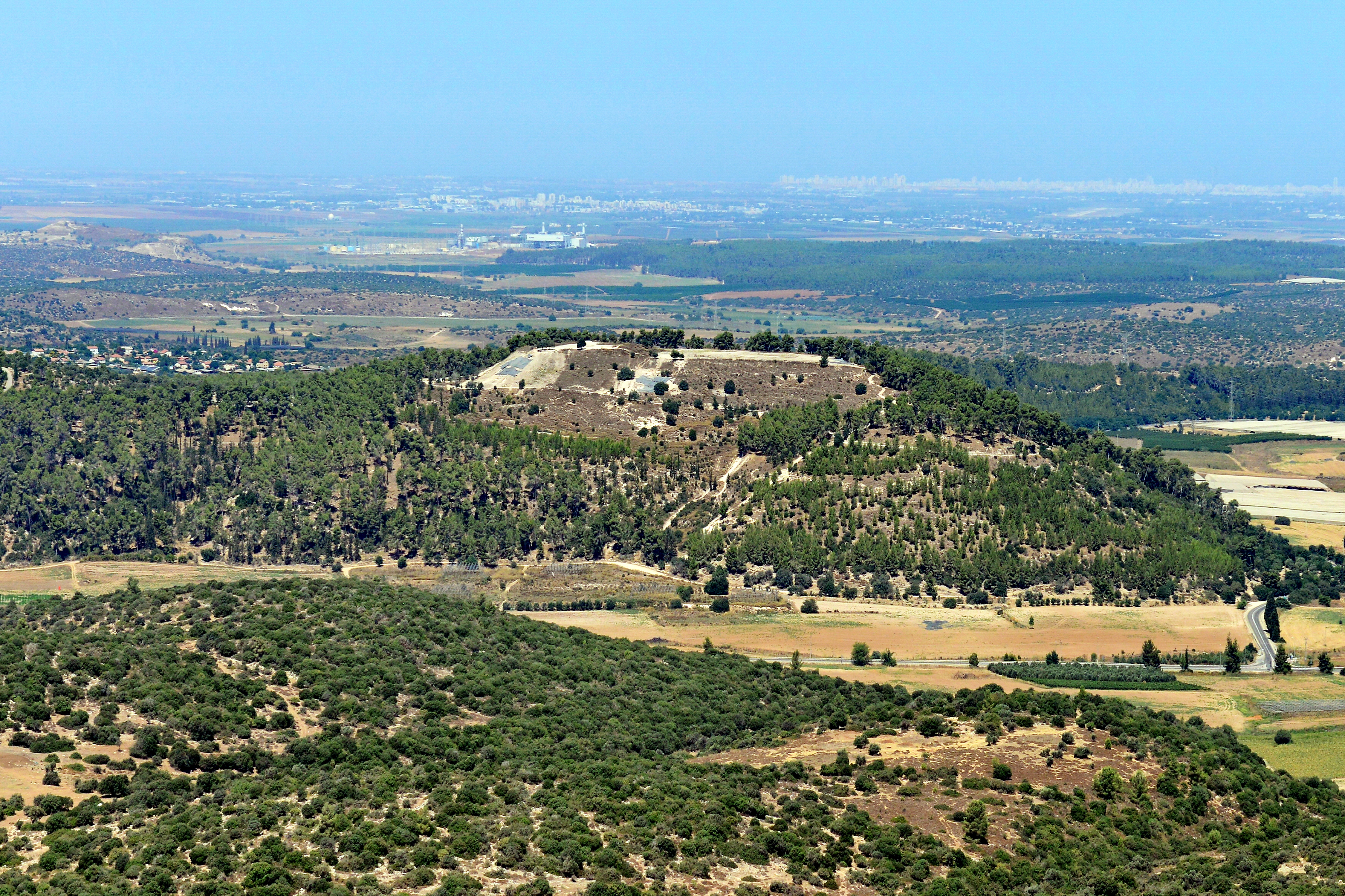 שרידי עיר מבוצרת על כיפה, בגדה הדרומית של נחל האלה. בחפירות נחשפו חומות, מצודה, מתקנים לעיבוד תוצרת חקלאית, מערות קבורה חצובות, בורות מים, מערות קולומבריום, ומערכות מסתור.